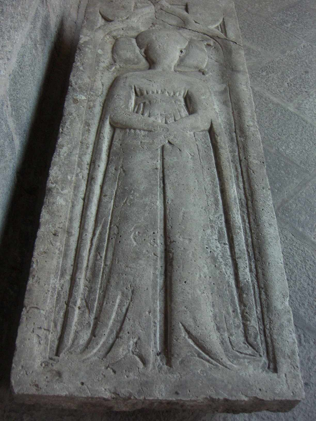 Chiostrino del Duomo di Monza - pietra tombale di Ursina Castiglioni (XV sec.)